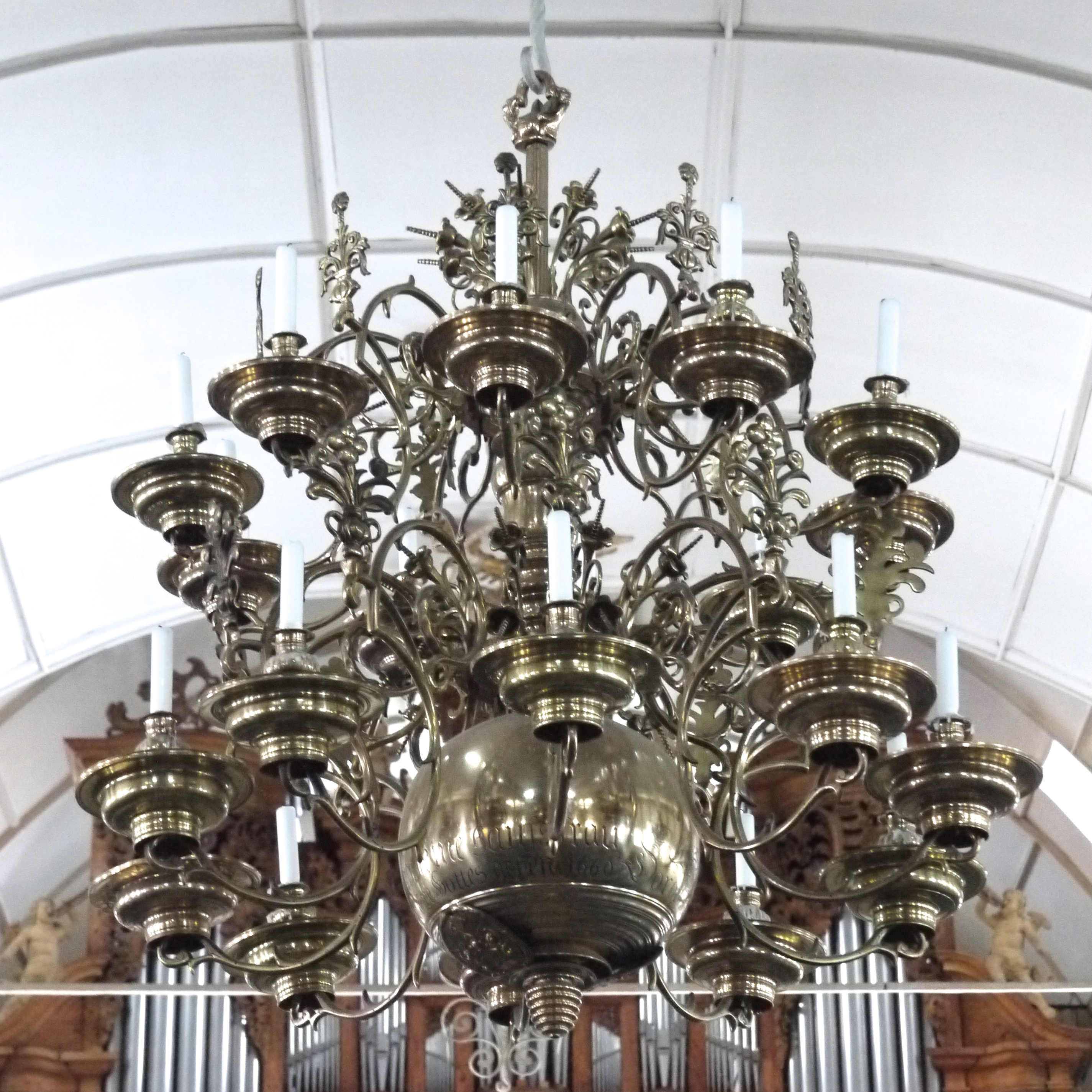 Marktkirche zum Heiligen Geist in Clausthal-Zellerfeld - Großer Kronleuchter